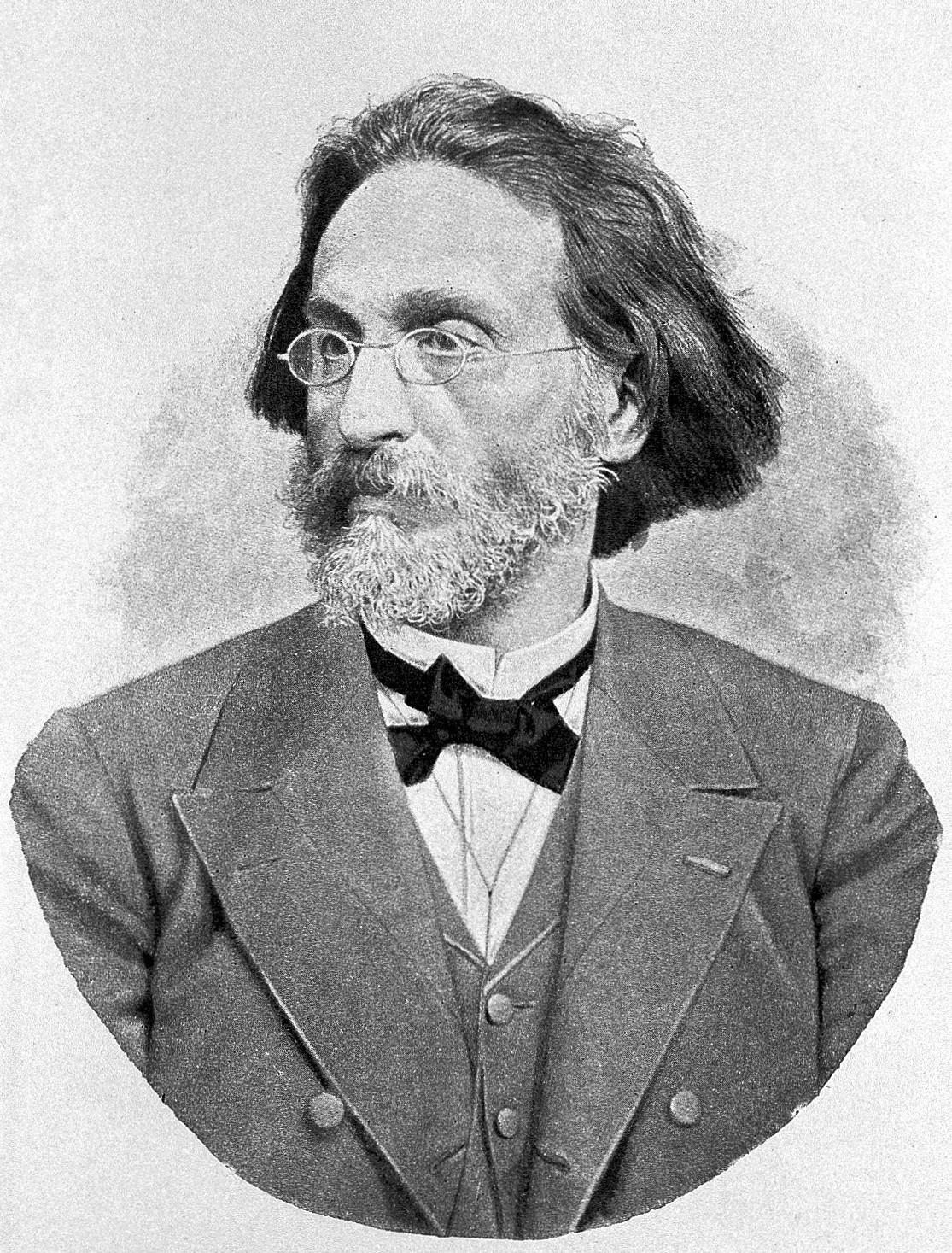 Georges Hayem. From: Centenaire de la Faculte de Medecine de Paris 1794-1894, Impr. Nationale, Paris 1896, facing page 354